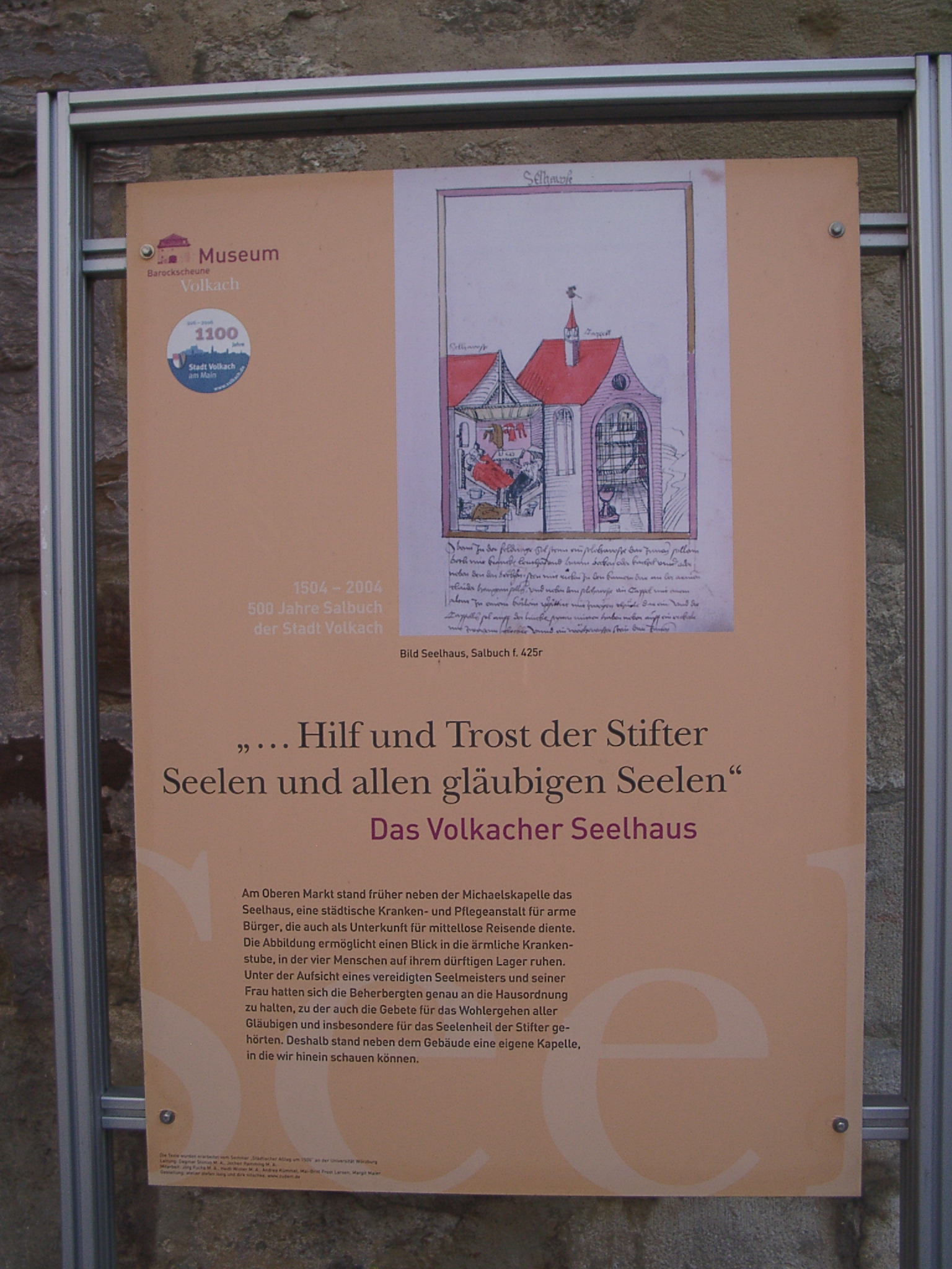 Volkach